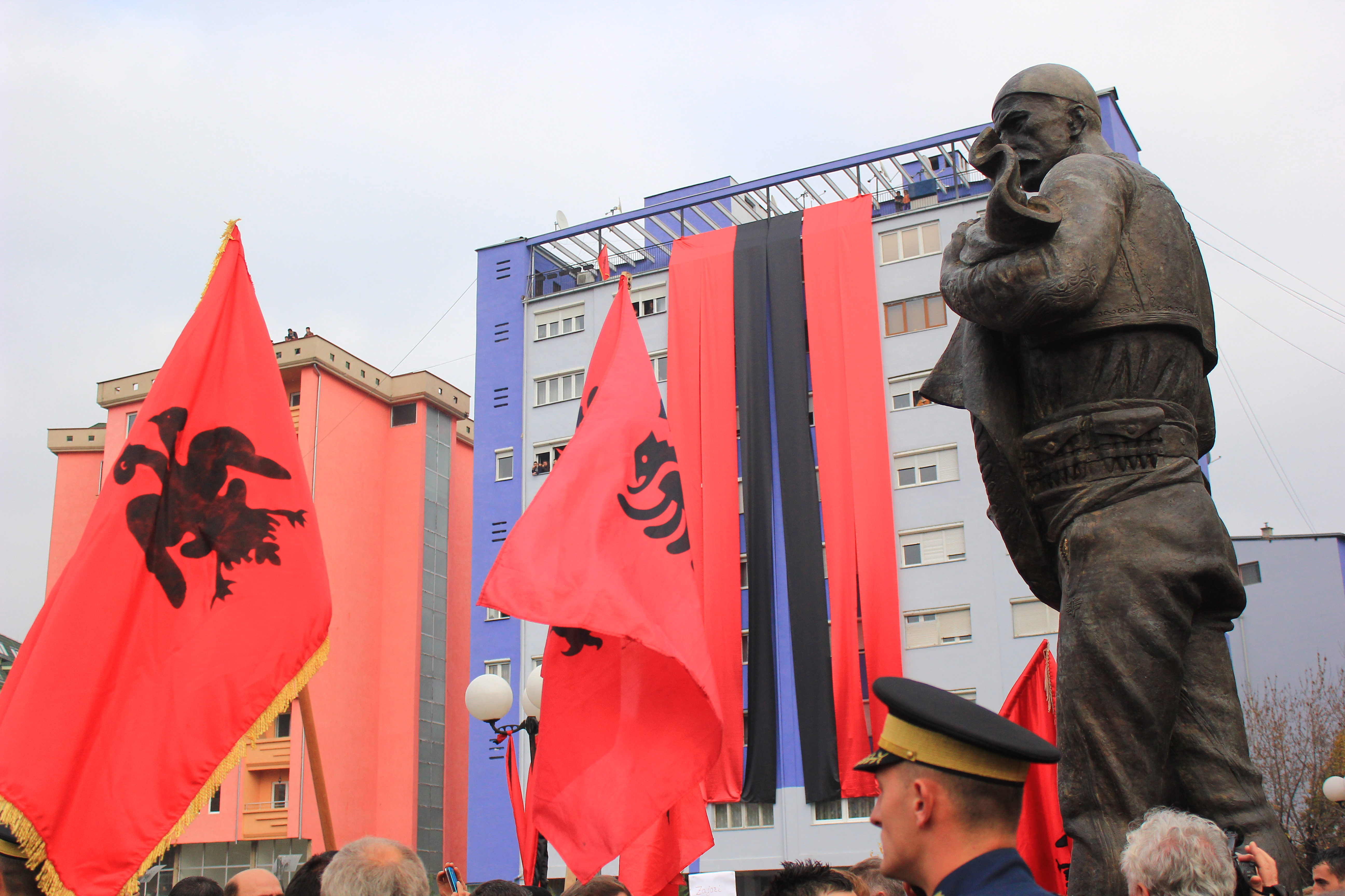 Shtatorja e 'Isa Boletinit' në Mitrovicë me rastin e përurimit të saj